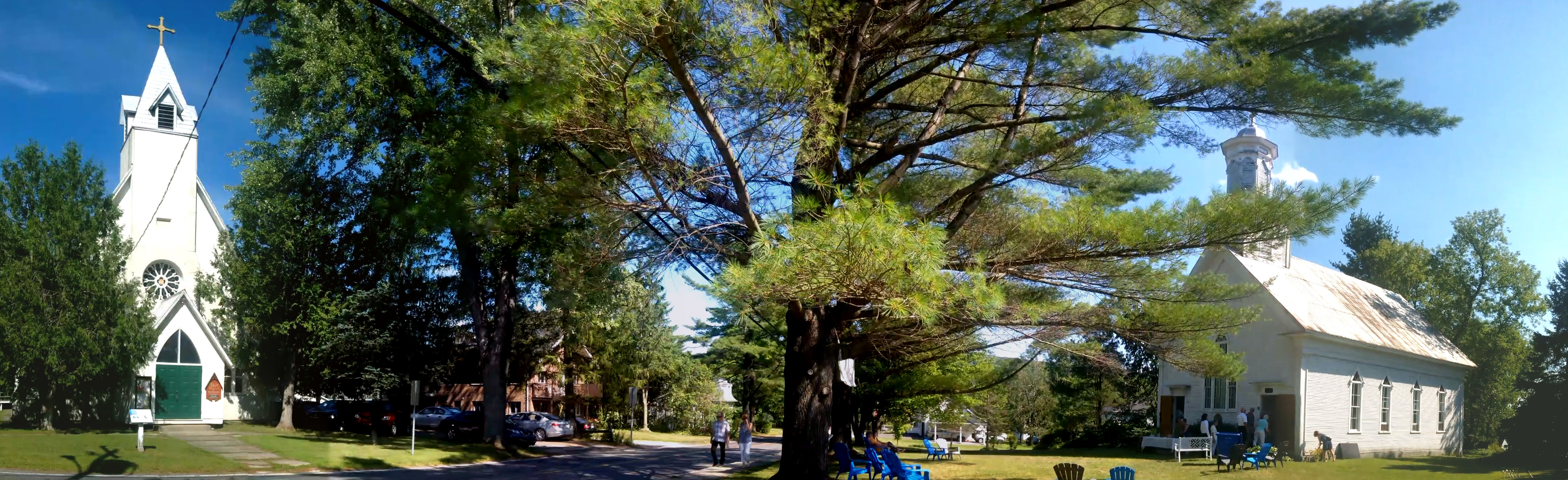 rue des deux églises, Abercorn, journée de concert.